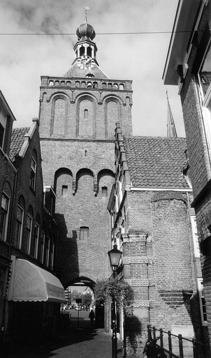 Binnenpoort, Culemborg